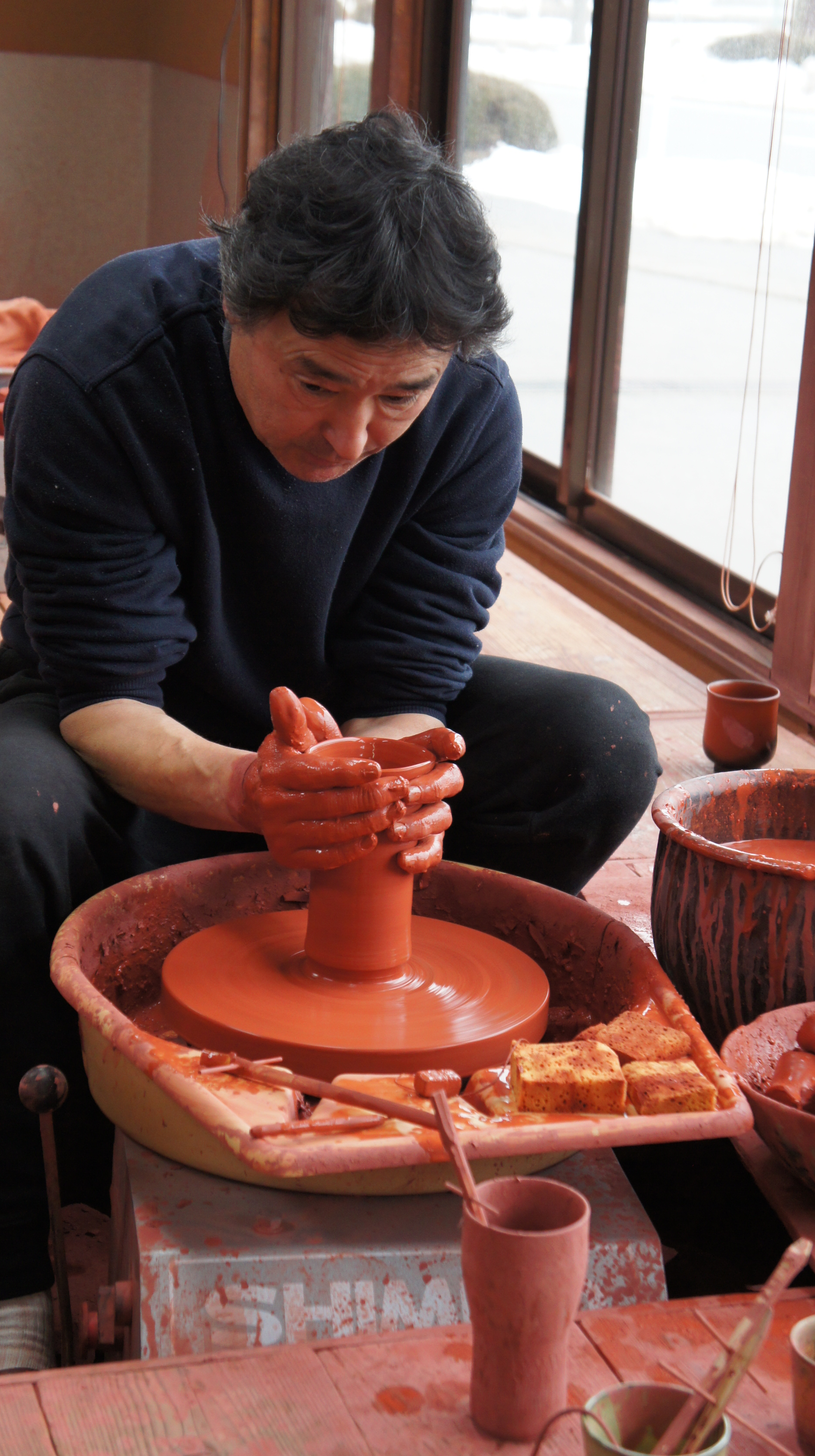 無名異焼 玉堂窯元 Gyokudo Pottery